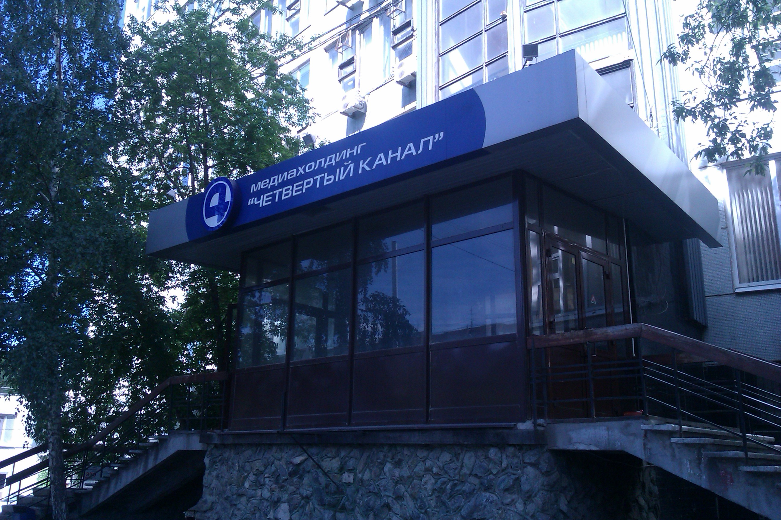 4 Kanal in Ekaterinburg // ru:4-й канал (Екатеринбург)